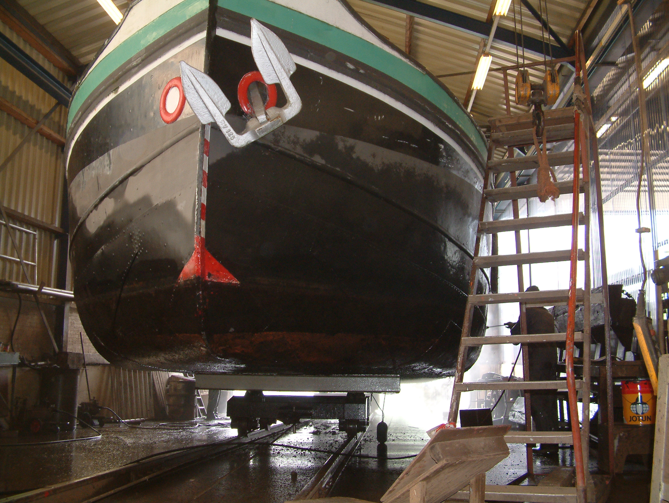 Hellingwagens van een werf in Hardinxveld-Giessendam